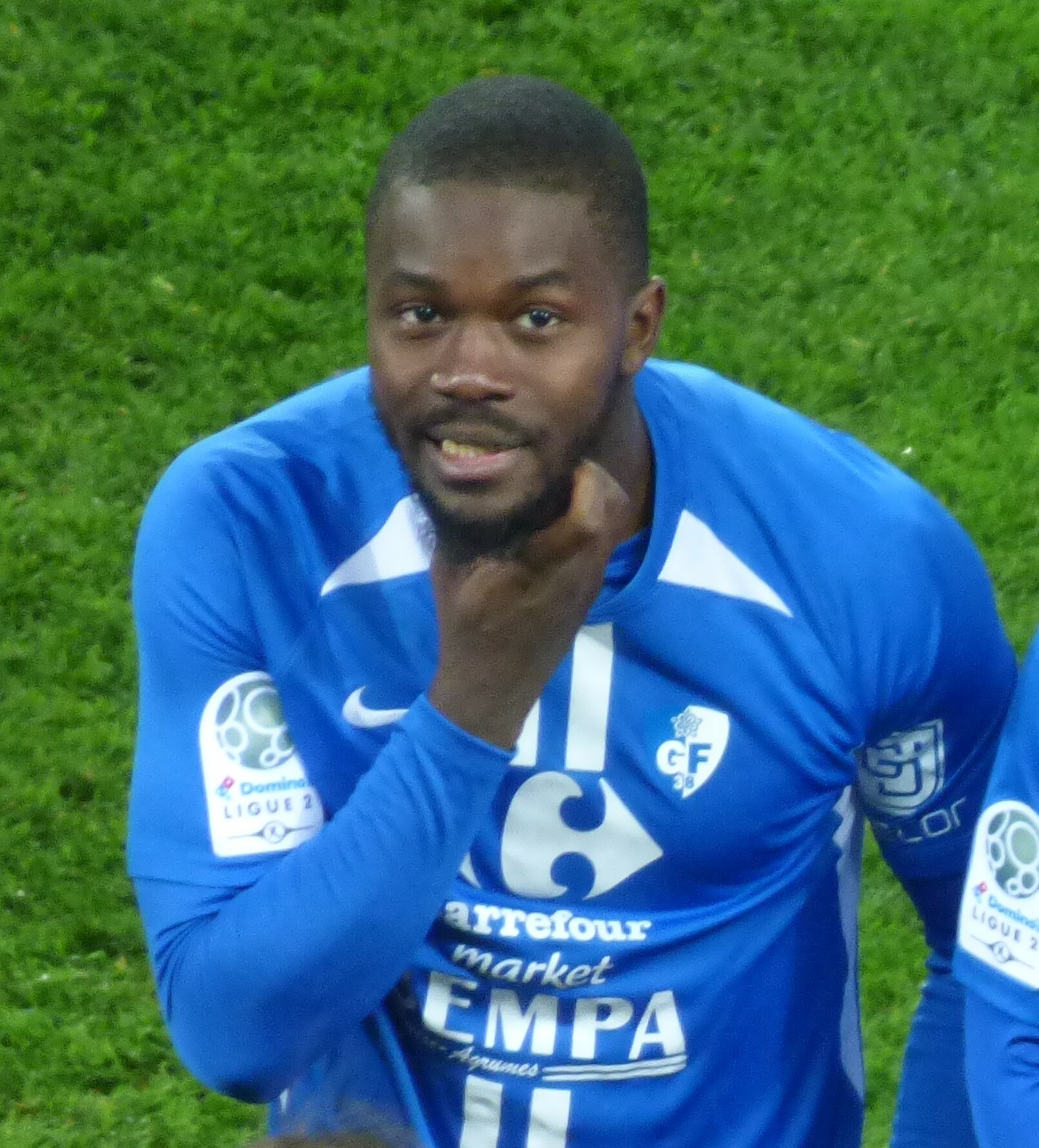 Arsene Elogo lors du match RC Lens / Grenoble Foot 38, le 10 février 2020, comptant pour la vingt-quatrième journée du championnat de France de football de Ligue 2 2019-2020, au Stade Bollaert-Delelis.